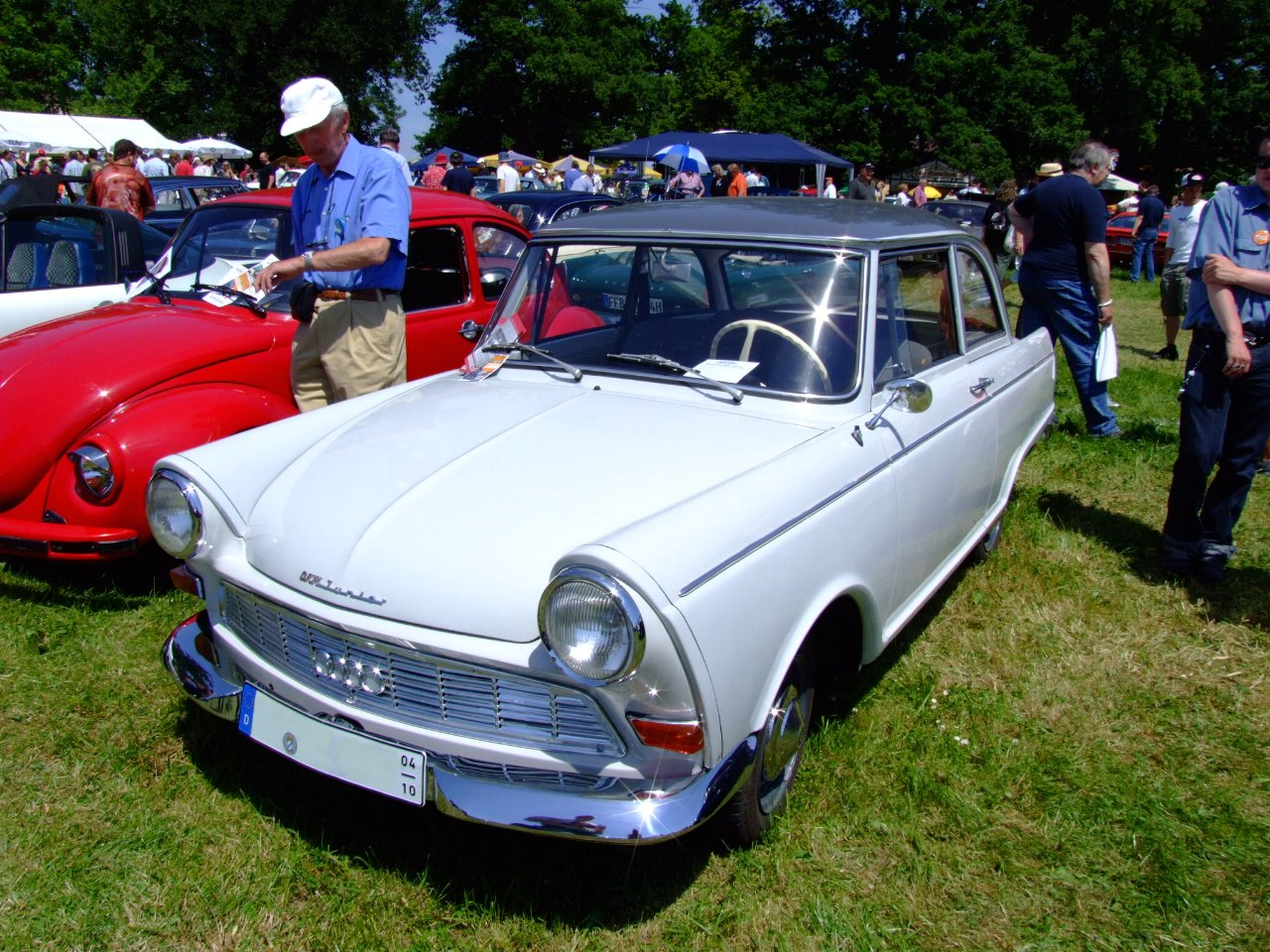 DKW Junior DeLuxe Baujahr: 1962 34 PS